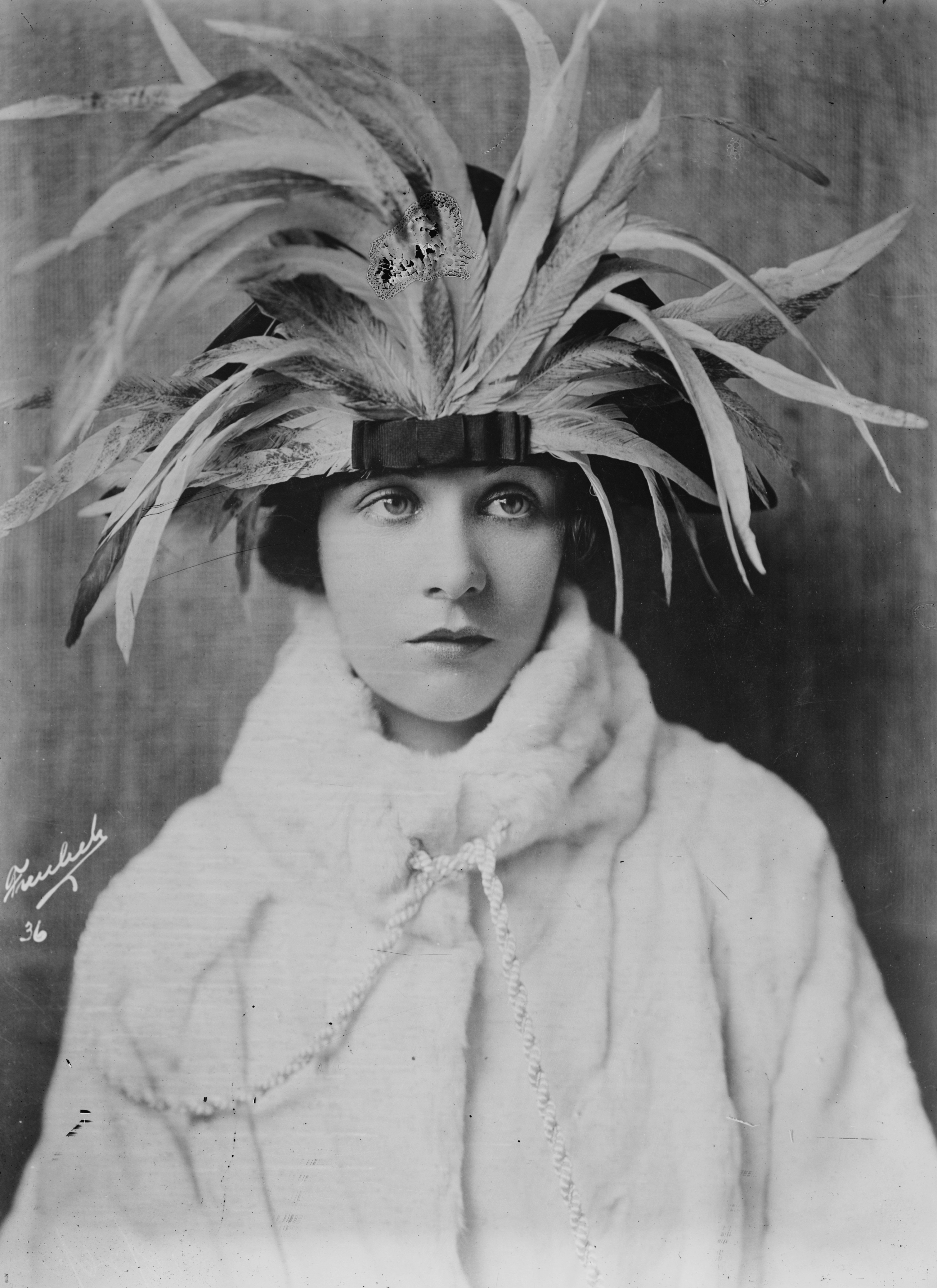 Actress Virginia Valli